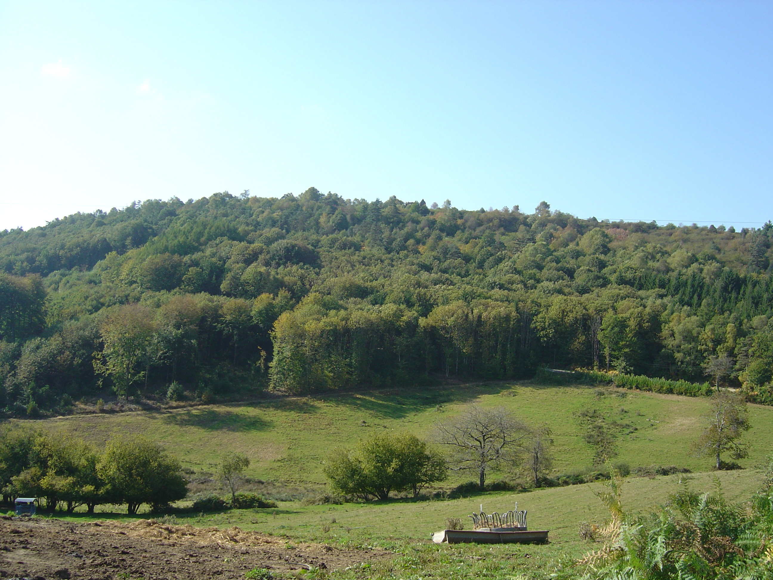 Le Mont Gargan vu depuis Saint-Gilles les Forêts